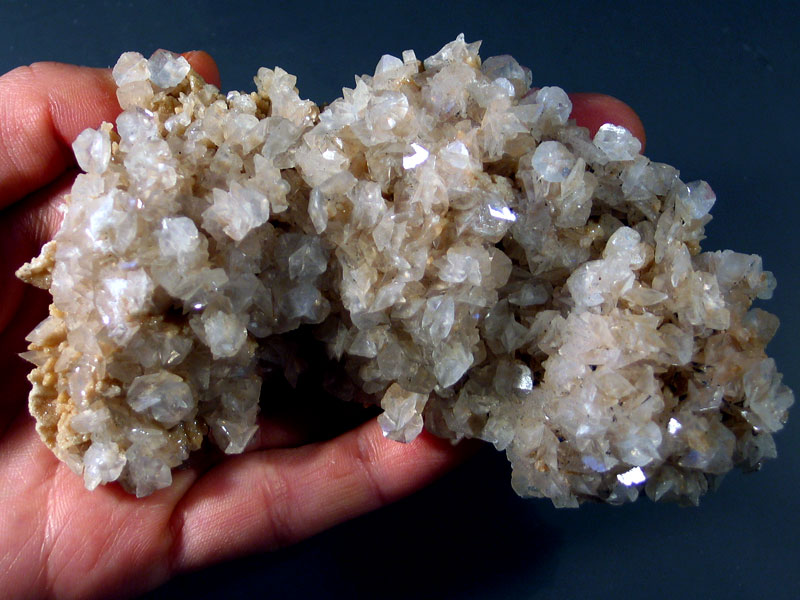 minerał; dolomit; pseudomorfoza po kalcycie, pochodzenie Rumunia; autor zdjęcia Stowarzyszenie Spirifer, 14.08.2006r.